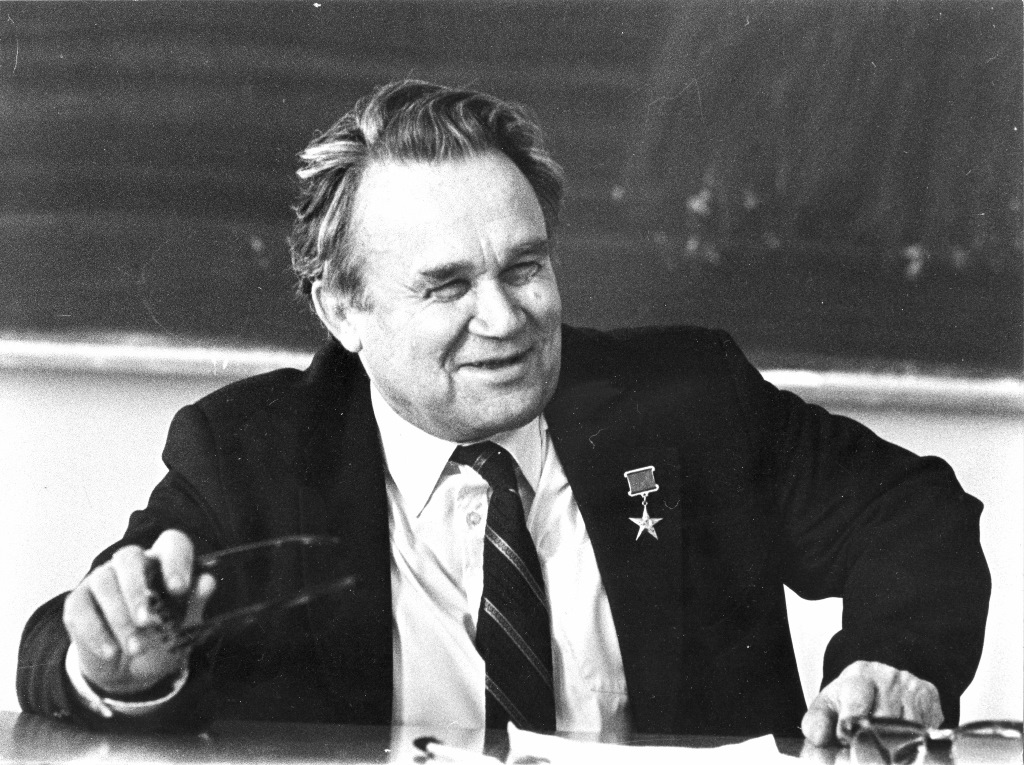 Александр Андреевич Самарский (1919—2008) — советский и российский математик, академик РАН, председатель Учёного совета ИММ РАН, зав. кафедрой вычислительных методов факультета ВМК МГУ.